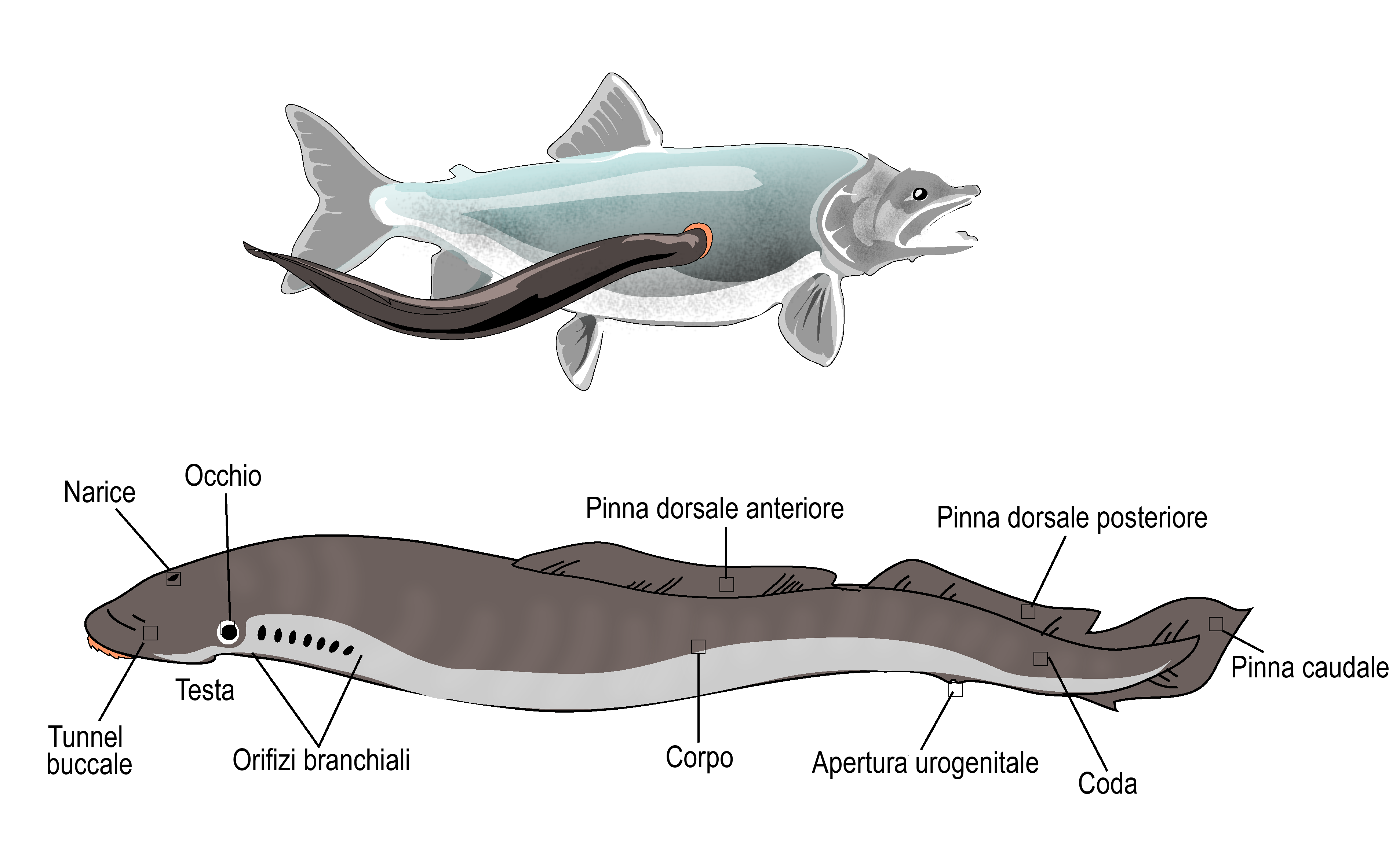 Disegno e schema anatomico di una lampreda - Traduzione in Lingua Italiana (Translation in Italian Language from English version image)